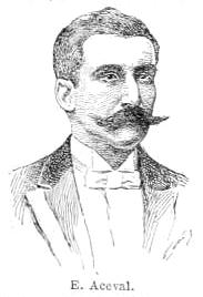 Emilio Aceval Marín